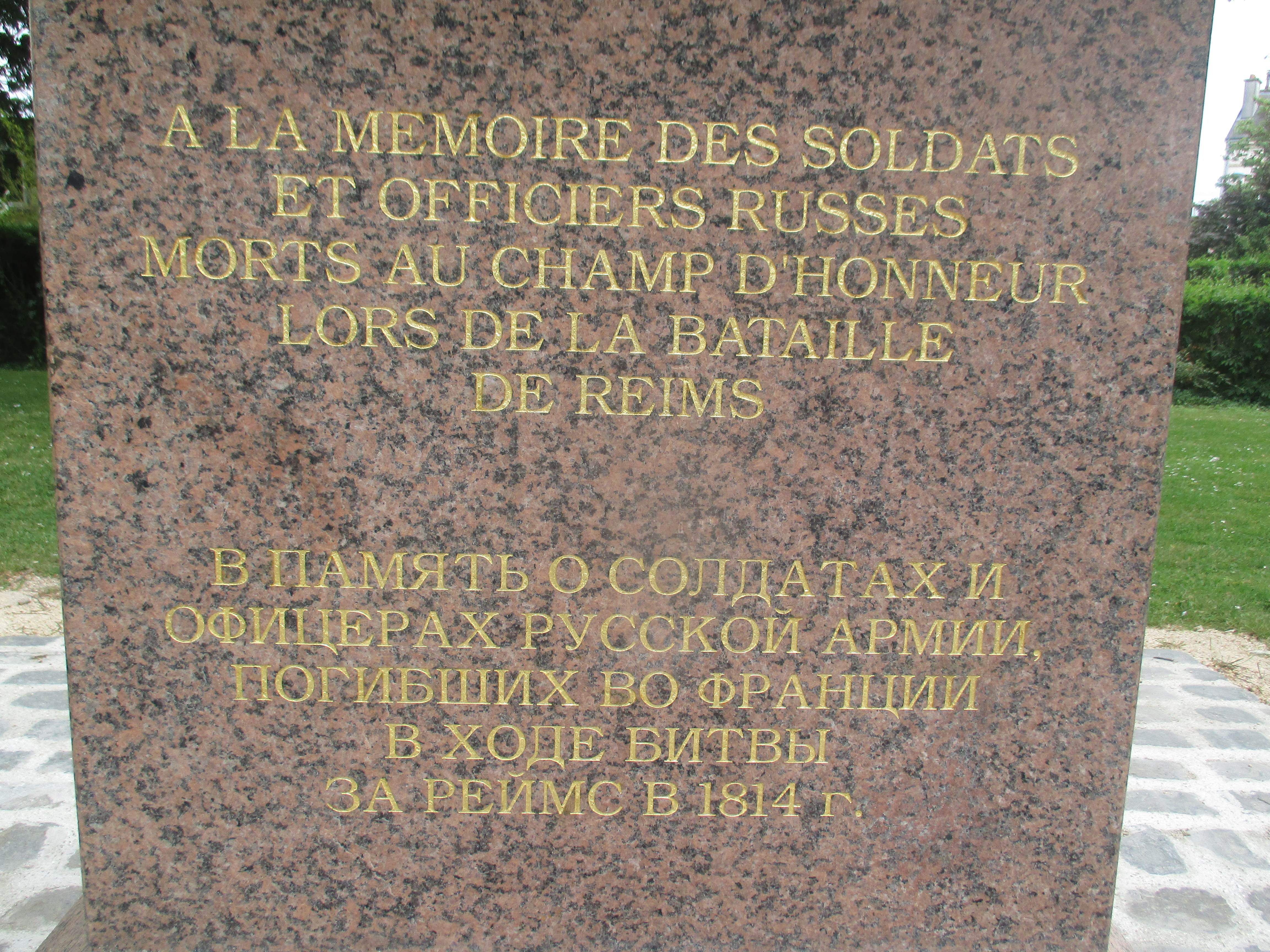 Obélisque en hommage aux soldats russes morts pendant la bataille de Reims en 1814.